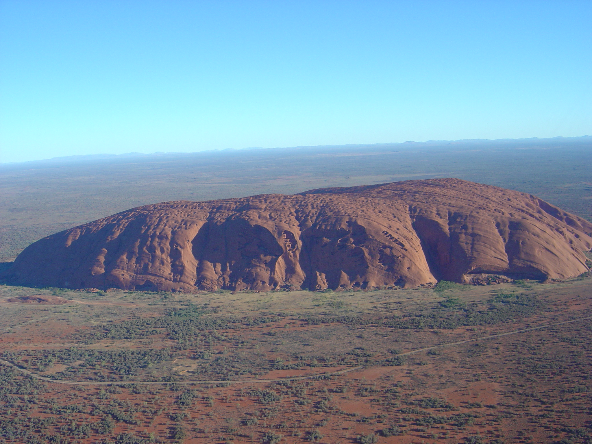 Uluru (Helicopter view)